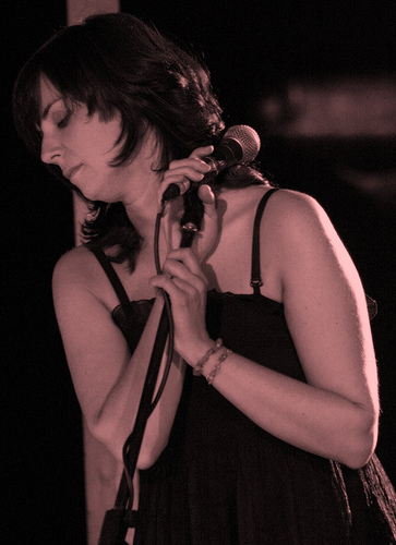 Cristina Donà nel concerto di Stazioni Lunari al Festival della Creatività di Firenze, Fortezza da Basso, 3 dicembre 2006